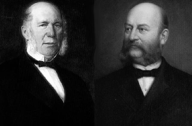 Hermann Henrich Meyer war der Gründer des Norddeutschen Lloyd, Johann G. Lohmann war sein Direktor von 1877-1892. Beide Personen haben eine eigene Wikipedia-Seite.